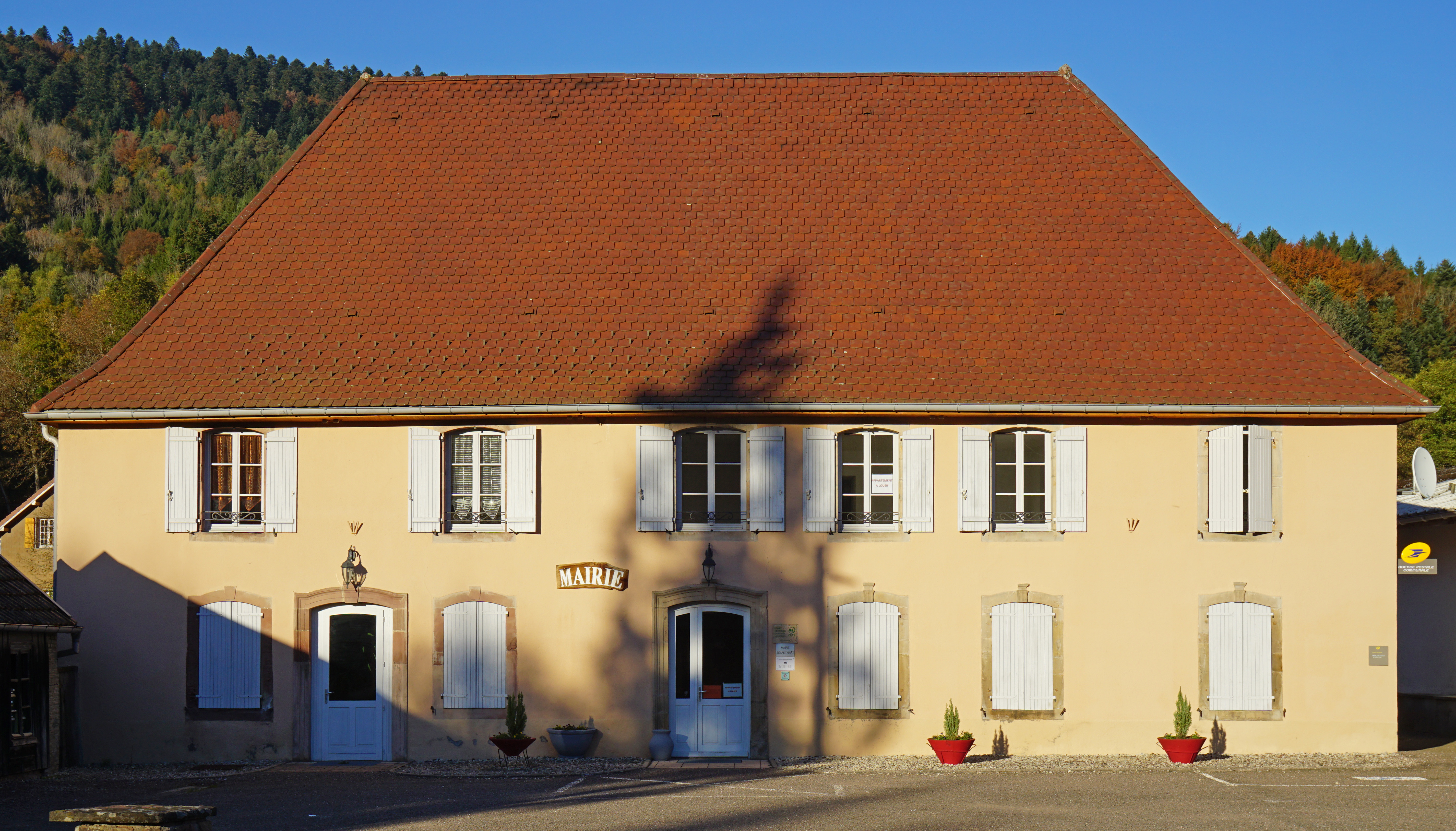 La mairie de Fresse.